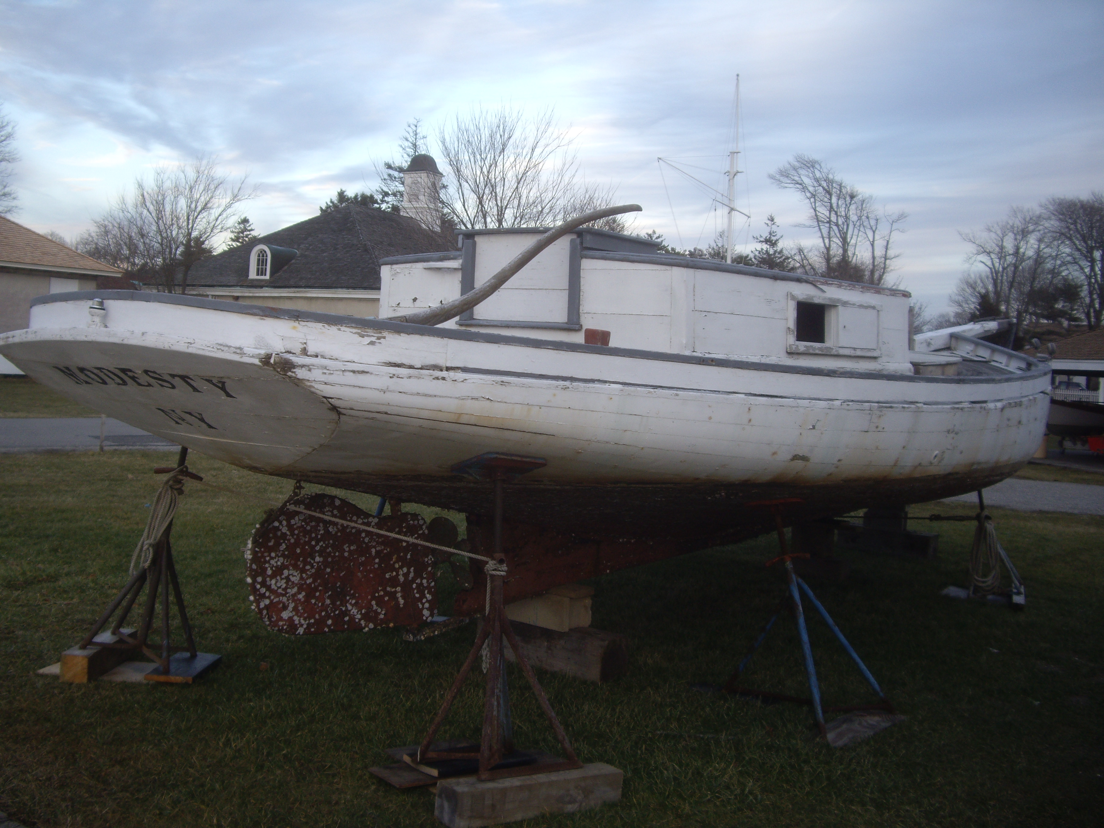 Modesty Sloop, Sayville, NY